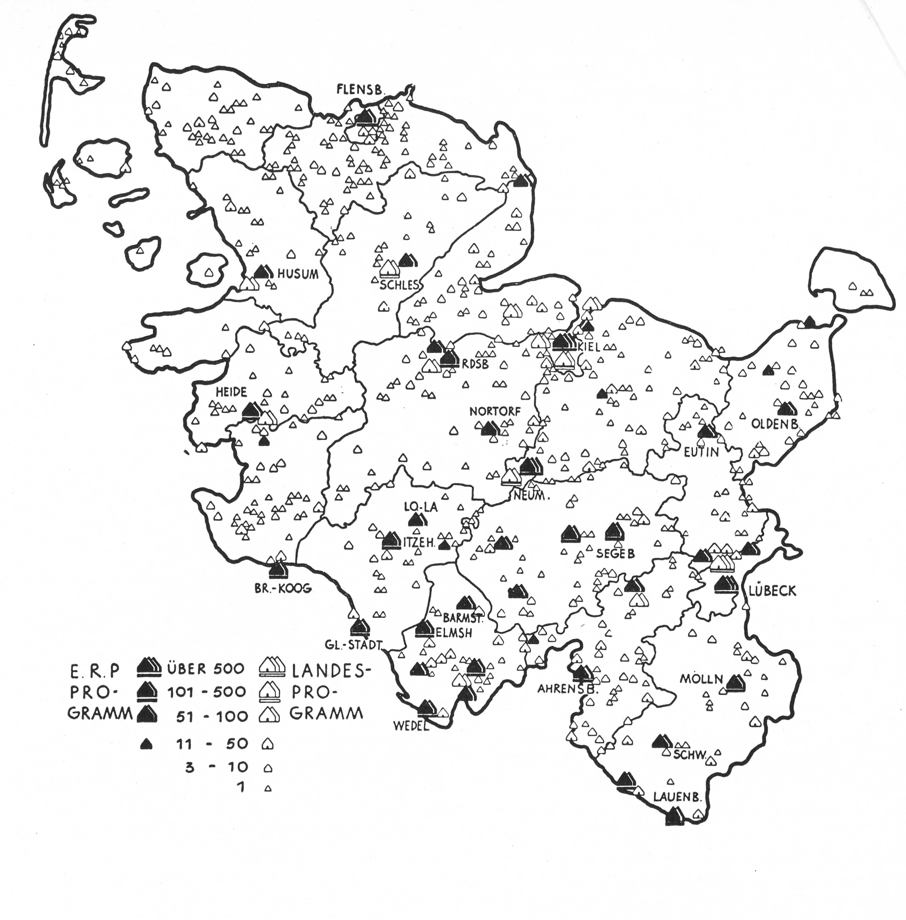 Verteilung der 10000 Wohnungen im Sonderprogramm und der Wohnungen im Allgemeinen Förderprogramm in Schleswig-Holstein